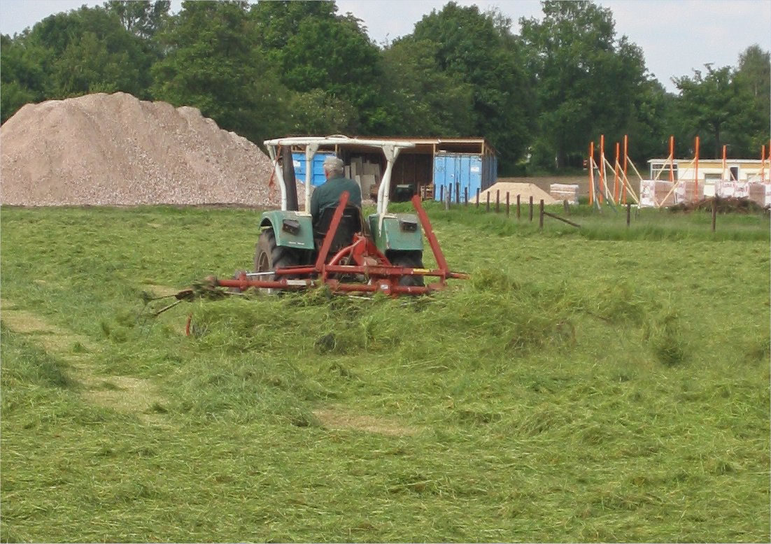 Grasschudder